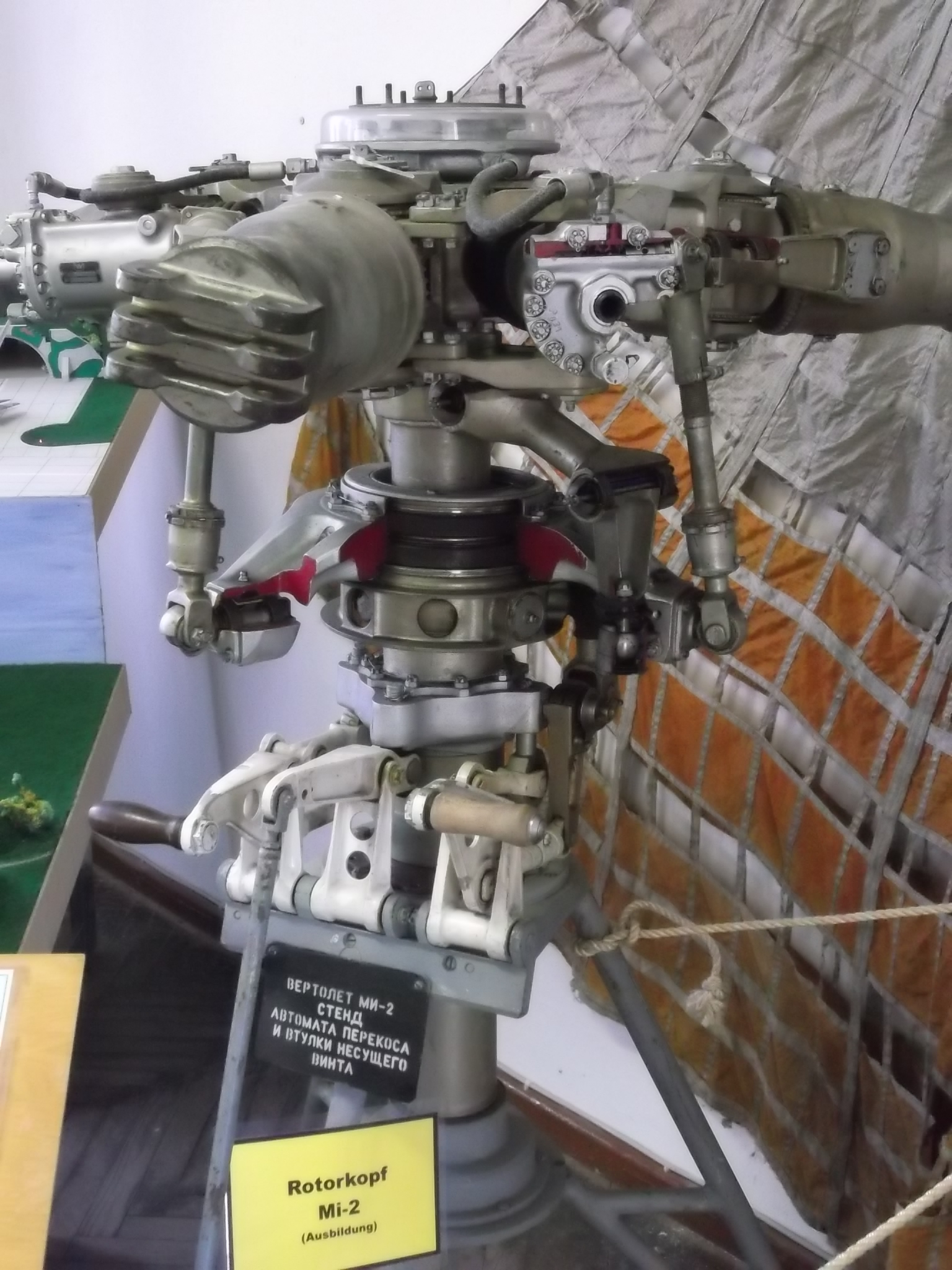 Rotorkopf der Mil-Mi2